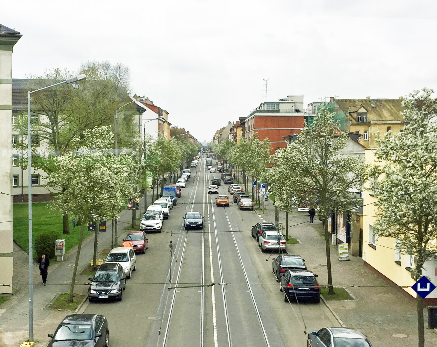 Mockauer Straße Richtung Zentrum Leipzig